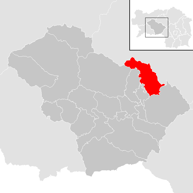 Lage von Sankt Marein-Feistritz im Bezirk Murtal